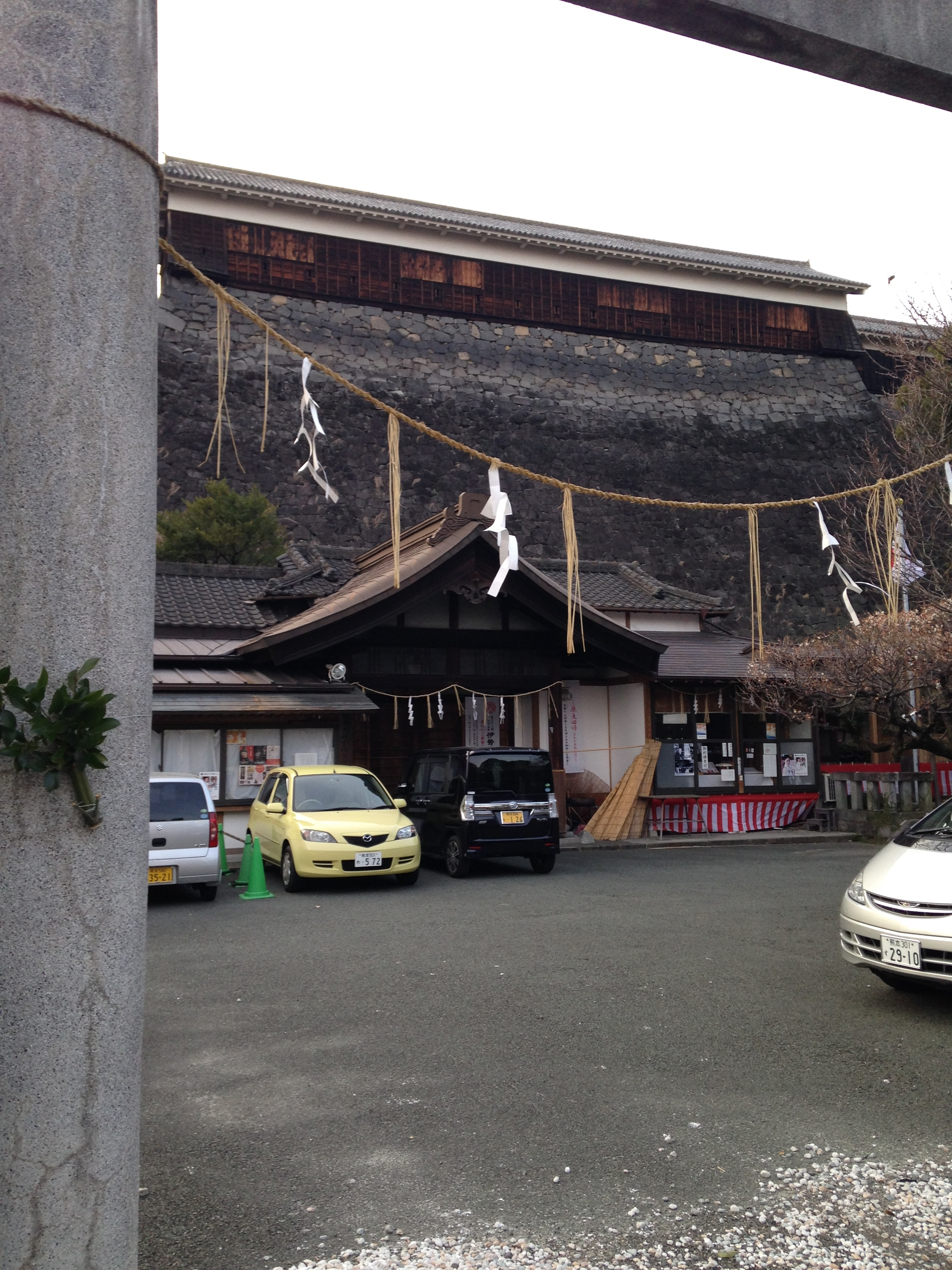 熊本大神宮の社務所